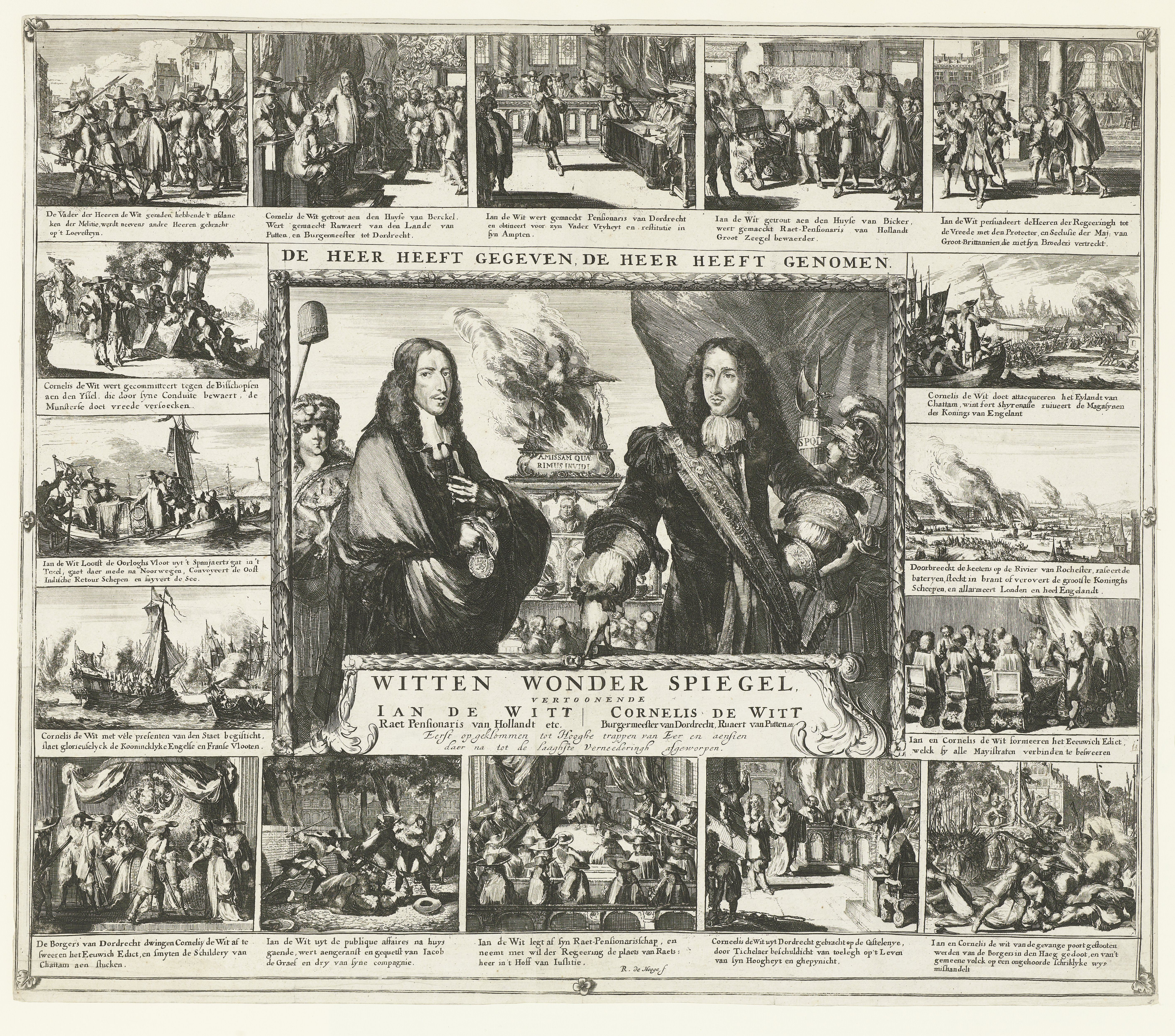 IdentificatieTitel(s): Witten Wonder Spiegel, 1675Witten Wonder Spiegel, vertoonende Ian de Witt Raet Pensionaris van Hollandt etc. / Cornelis de Witt Burgermeester van Dordrecht, Ruaert van Putten etc. Eerst opgeklommen tot Hooghe trappen van Eer en aensien daer na tot de laaghste Verneederingh afgeworpen (titel op object)Objecttype: prent historieprent Objectnummer: RP-P-OB-67.709Catalogusreferentie: FMH 2390Hollstein Dutch 86Atlas van Stolk 2478Omschrijving: Prent uit 1675 Waar: in teruggekeken wordt op de opkomst en ondergang van de gebroeders De Witt. Centraal in de prent is het portret van de twee mannen voor een brandoffer waaruit een fenix verrijst. Hier omheen zestien kleinere voorstellingen van de belangrijkste gebeurtenissen uit het leven van Johan en Cornelis de Witt. Bij de prent behoort het tekstblad 'Op en Ondergangh der Heeren Cornelis en Jan de Wit.' (zie inv.nr. RP-P-OB-67.710). De prent is de pendant van de Romeyn de Hooghes 'Orangien Wonderspiegel' (FM 2304), eveneens uit 1675.VervaardigingVervaardiger: prentmaker: Romeyn de Hooghe (vermeld op object)naar eigen ontwerp van: Romeyn de Hoogheuitgever: Romeyn de HooghePlaats vervaardiging: prentmaker: Nederlanduitgever: AmsterdamDatering: 1675Fysieke kenmerken: etsMateriaal: papier Techniek: etsenAfmetingen: blad: h 486 mm × b 564 mmOnderwerpWat: fabulous animals ~ birds: phoenixRampjaarDood van de gebroeders De WittWanneer: 1672 - 1672WaarHollandDordrechtWie: Johan de WittCornelis de WittVerwerving en rechtenVerwerving: overdracht van beheer 1816Copyright: Publiek domein